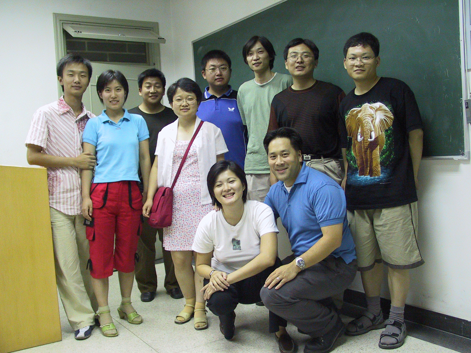 ZH Wikipedians, July 25, 2004, at Beijing University 前排右侧是Fuzheado，左侧是他的夫人。后排左起依次为：金色葡萄及其女友，educhn，中科院数字图书馆的一位研究人员，Sunzx，Shizhao，Mountain，中科院数字图书馆的毛军博士。